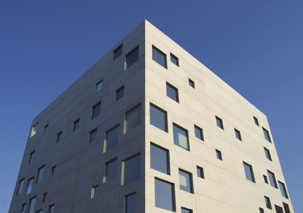 Bildbeschreibung: Die Zollverein School of Management and Design auf dem Gelände der Zeche Zollverein in Essen. Entwurf: Kazuyo Sejima und Ryue Nishizawa (2003) Fotograf: Jesse Krauß Datum: 2006